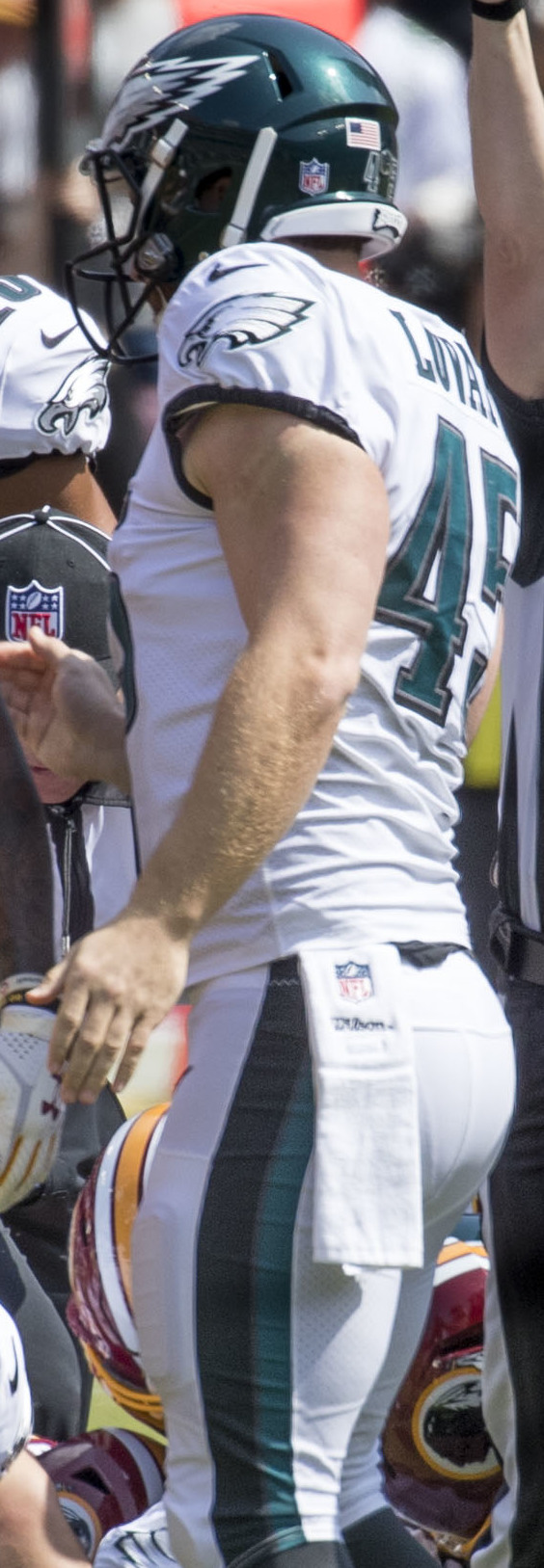 Eagles at Redskins 9/10/17